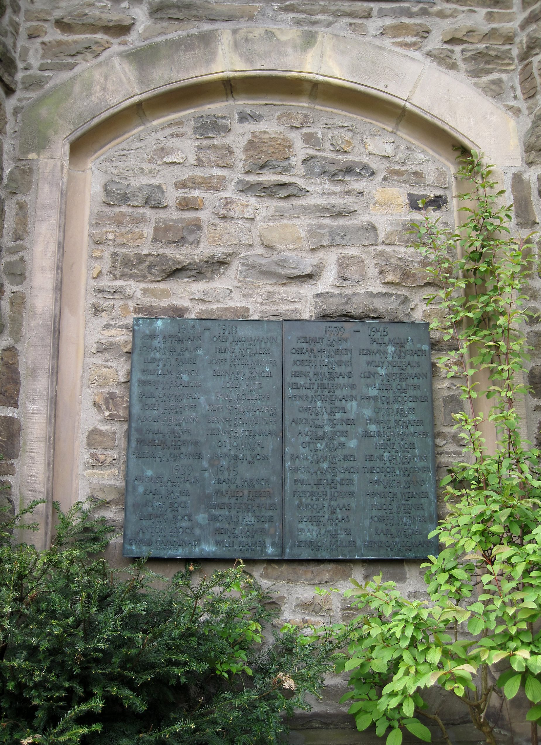 Gedenktafeln an der katholischen Kirche St. Bonifatius in Hemer-Sundwig für die Gefallenen im Ersten und Zweiten Weltkrieg.